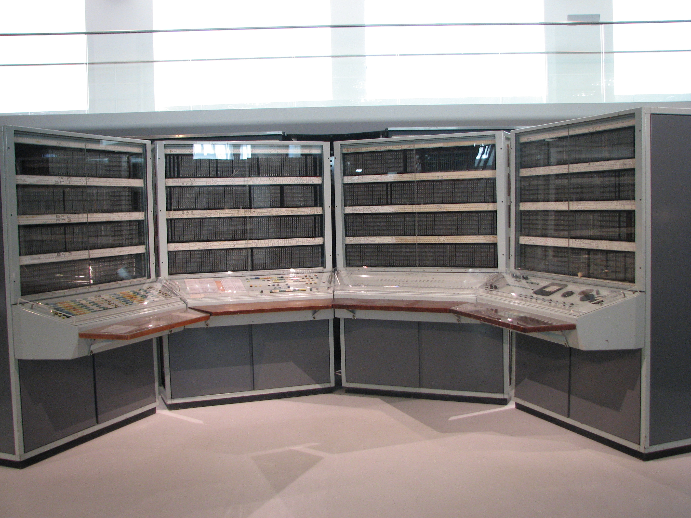 БЭСМ-6 в экспозиции Музея науки, г. Лондон, Великобритания